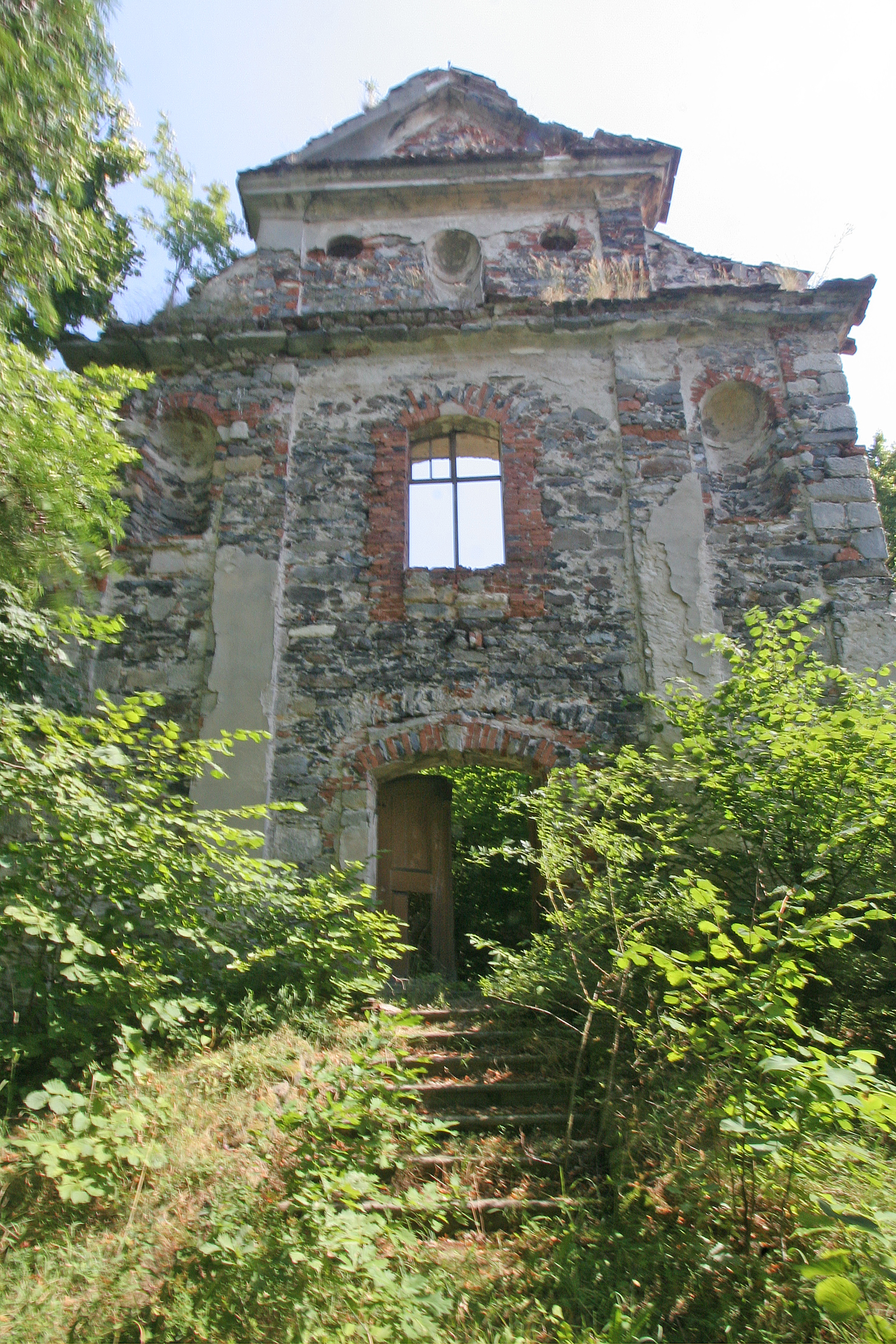 Kostel sv. Havla (Bílý Kostelec), Bílý Kostelec